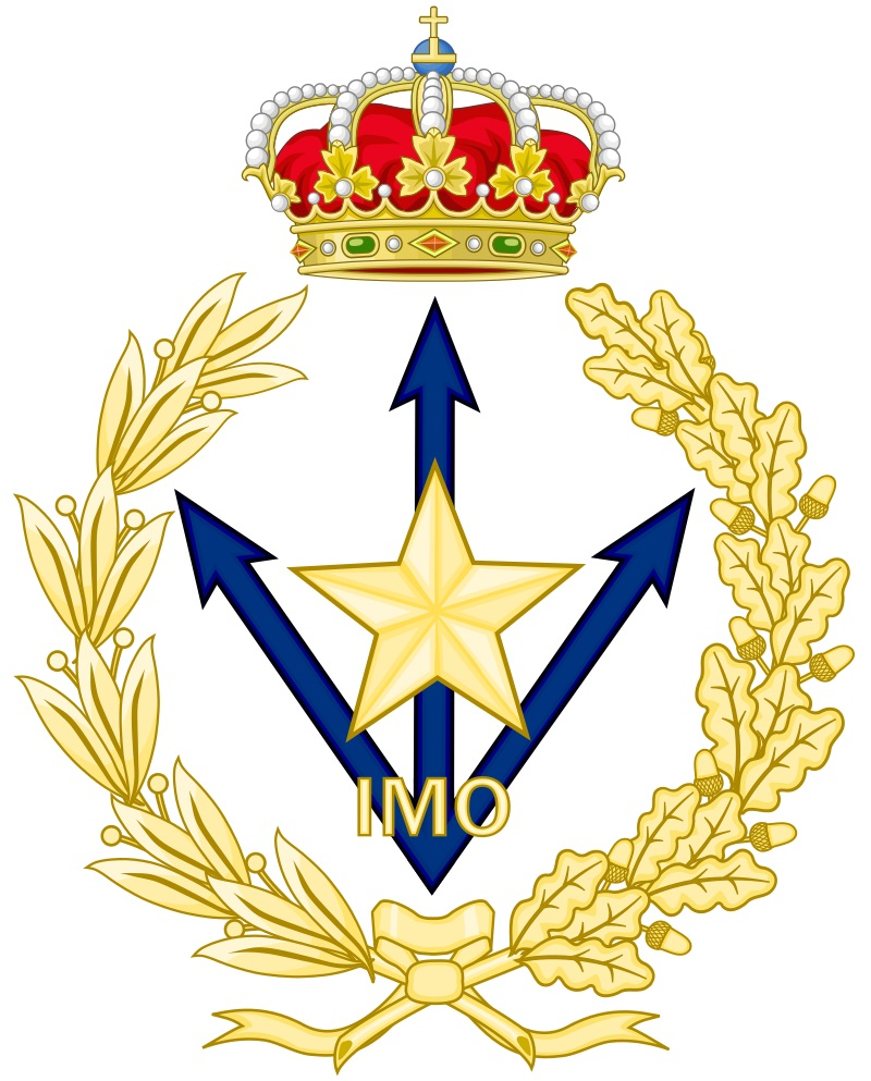 Escudo del Centro de Investigación Operativa